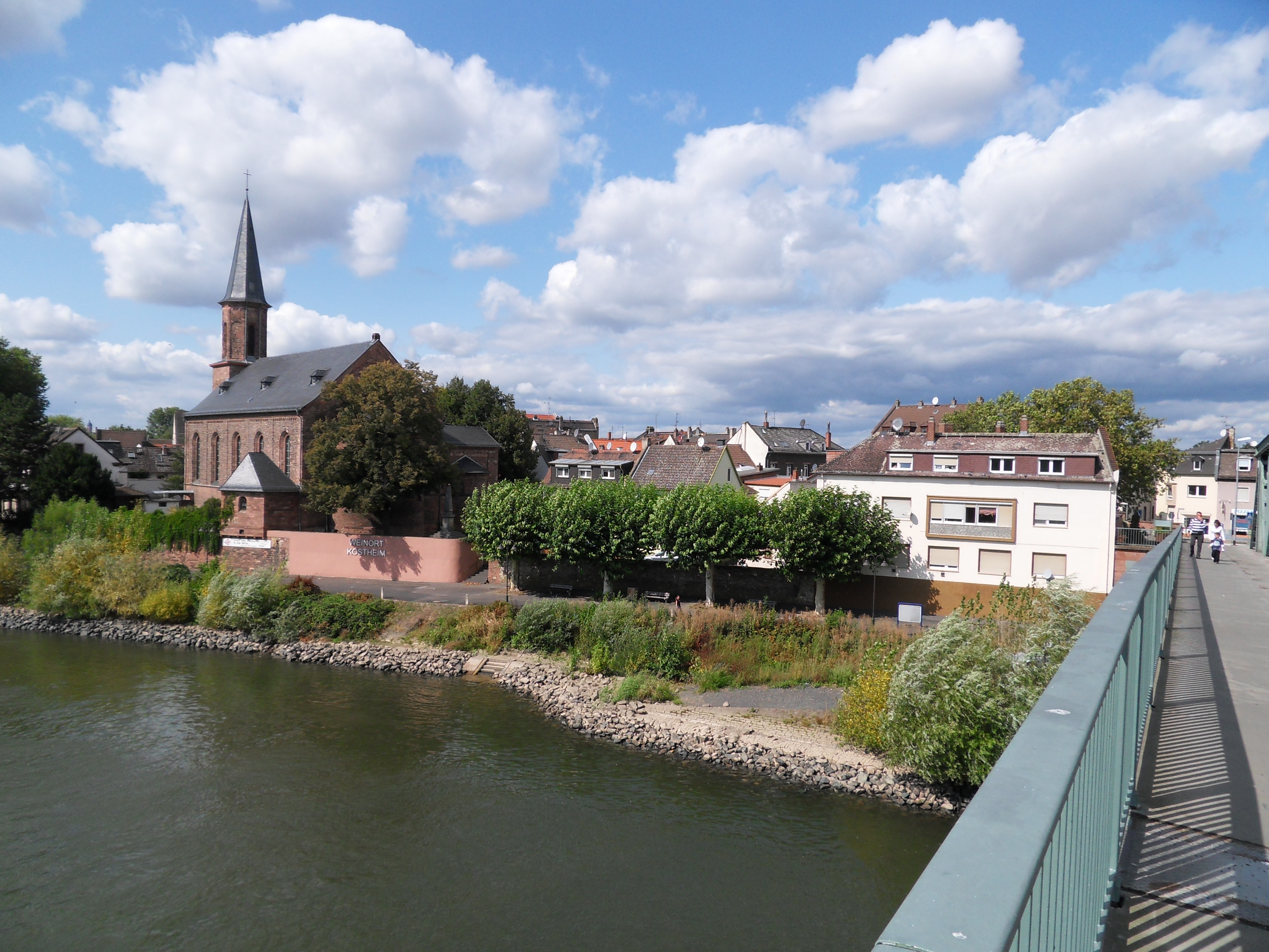 Blick auf das Mainufer in Mainz-Kostheim mit katholischer Pfarrkirche St. Kilian von der Mainbrücke aus gesehen